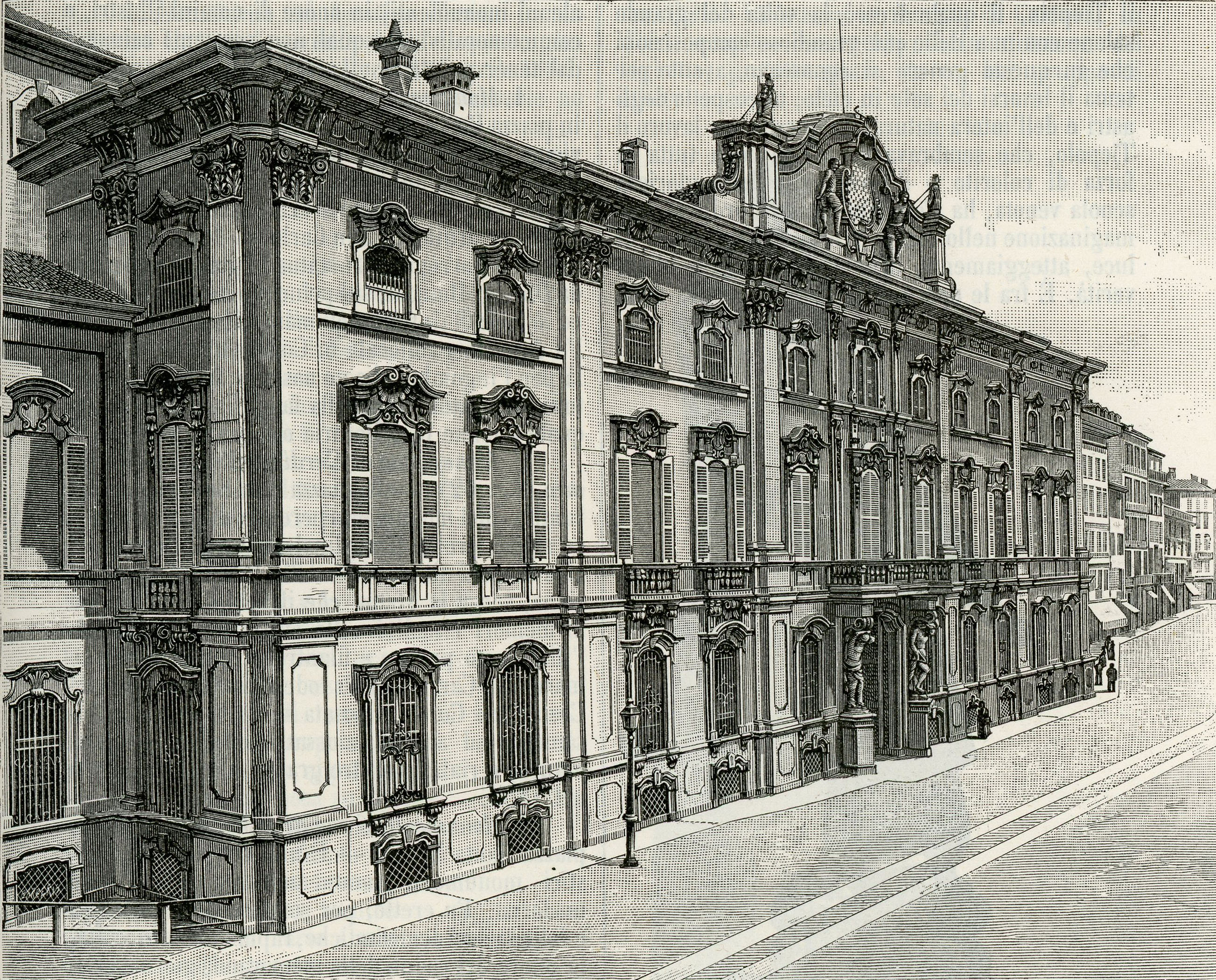 Milano: Palazzo Litta (xilografia di Giuseppe Barberis).